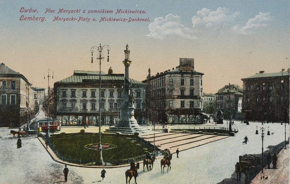 Lwów, pl. Maryacki